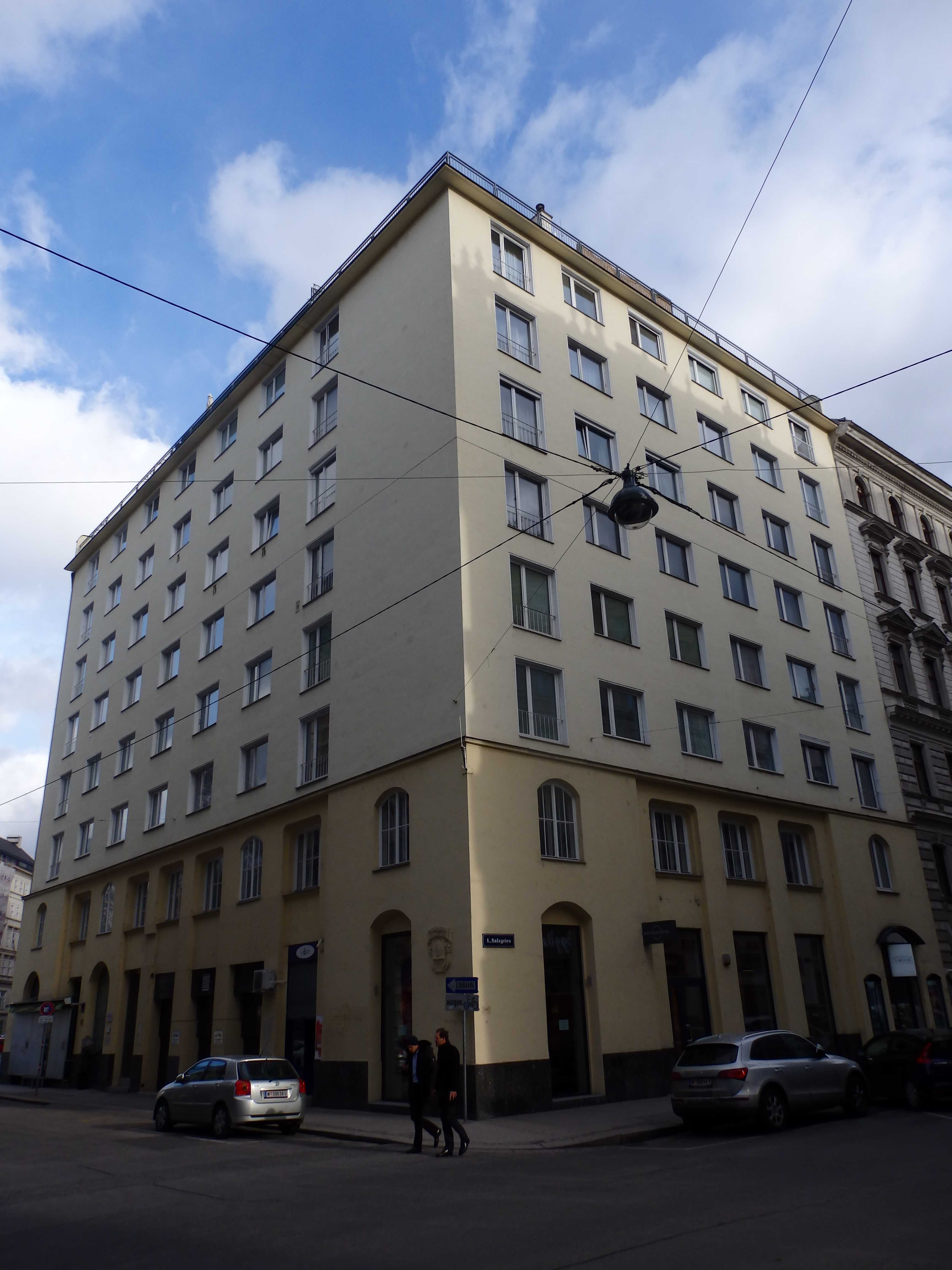 Wohnhaus (1882) von Adolf Hofbauer, Gölsdorfgasse 2, Wien-Innere Stadt